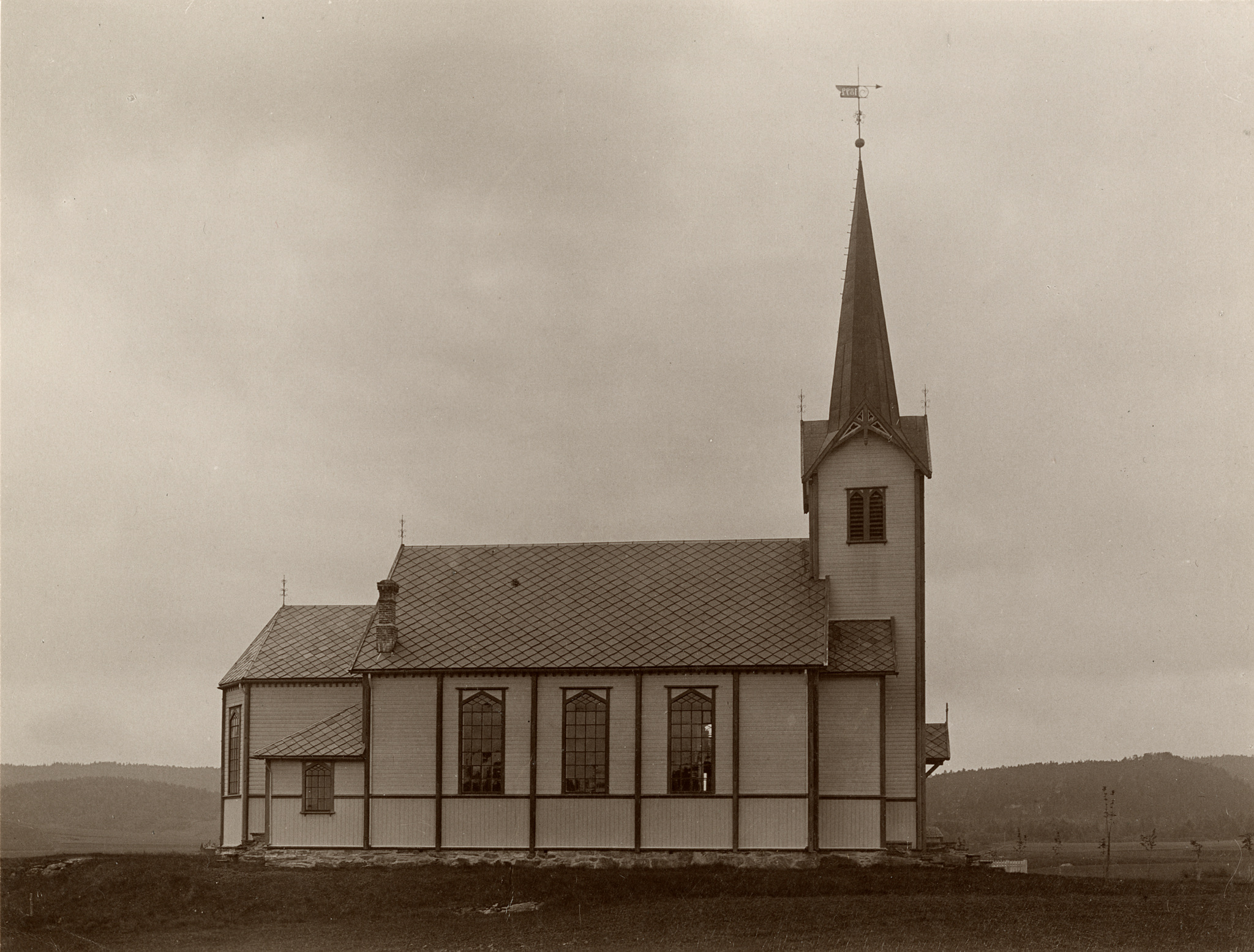 Ekne kirke, Levanger kommune. Foto: Christian Christensen Thomhav, fra Kulturminnebilder.no.